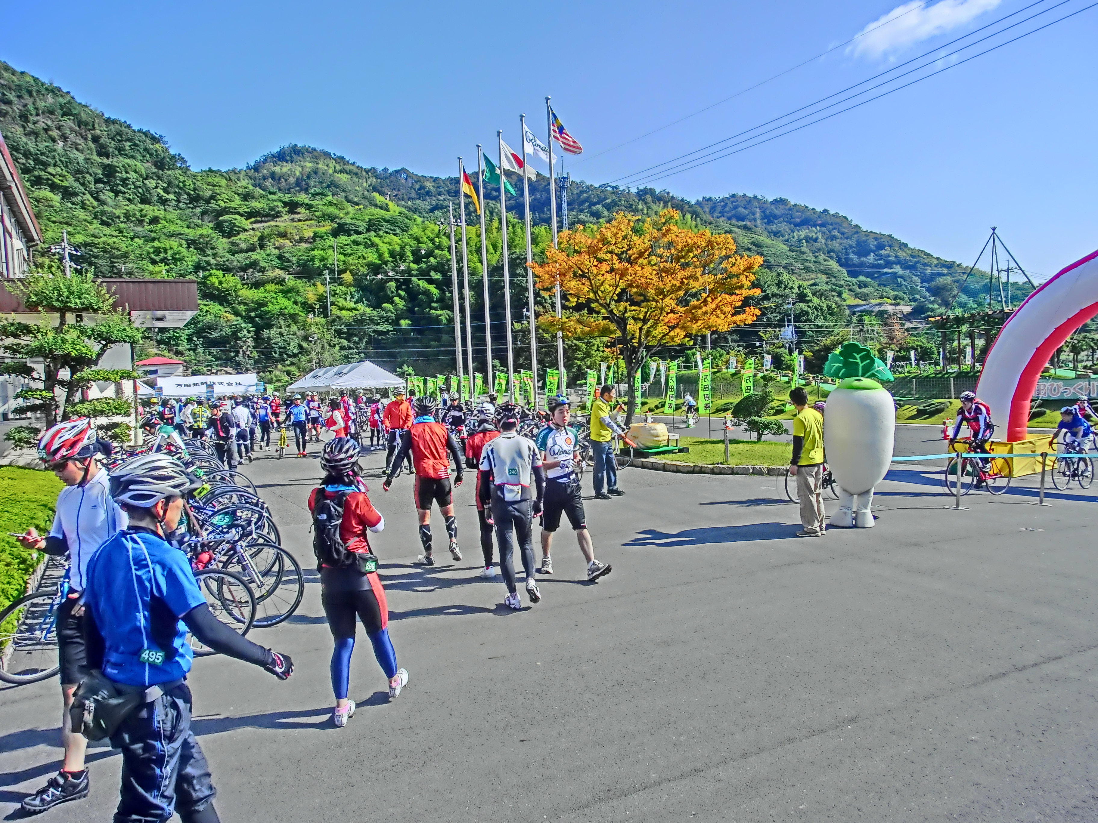 万田酵素本社工場；サイクリングイベントのエイドステーション中の写真。